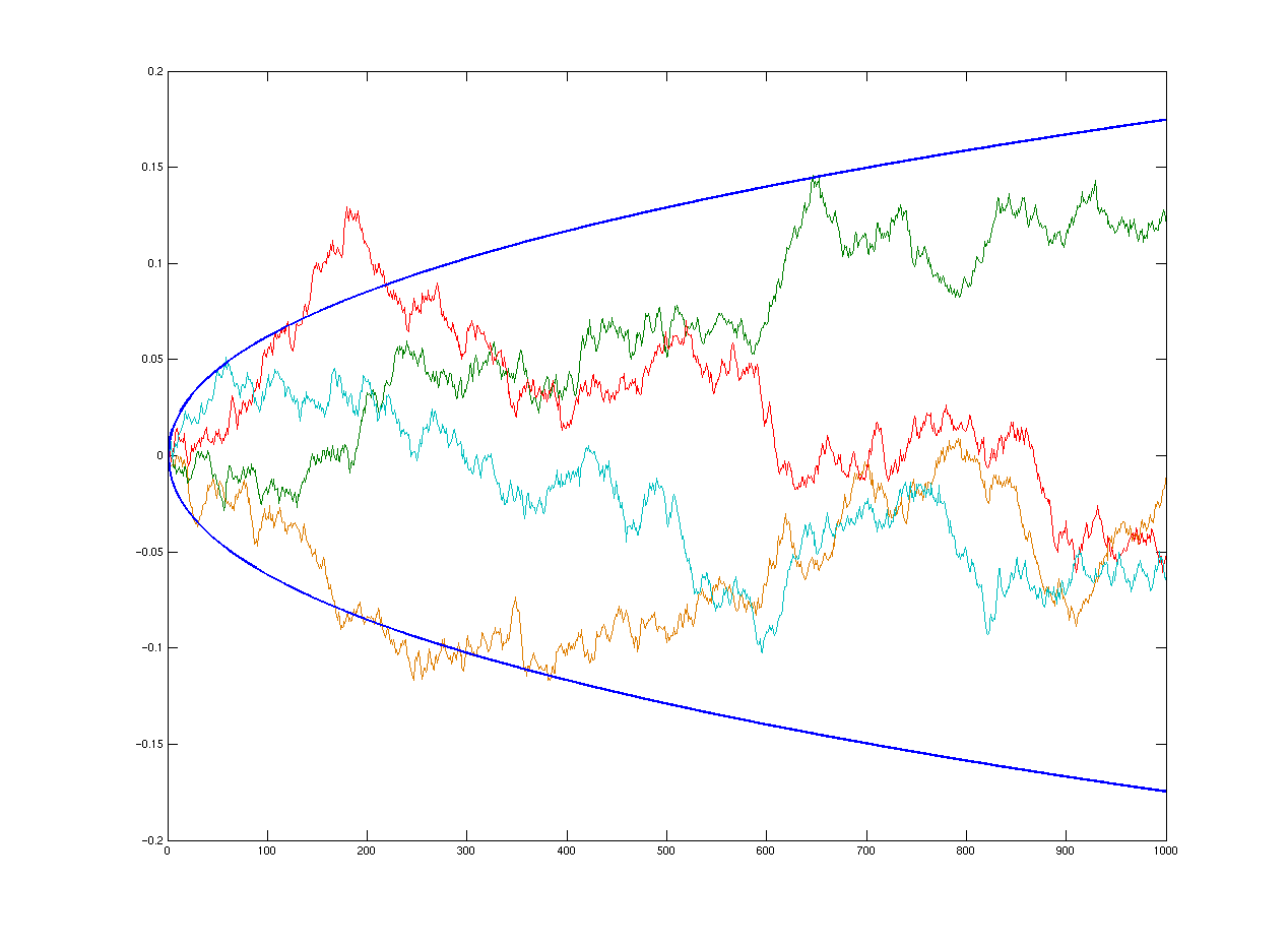 Skizze für die letzten beiden Gesetze des iterierten Logarithmus.